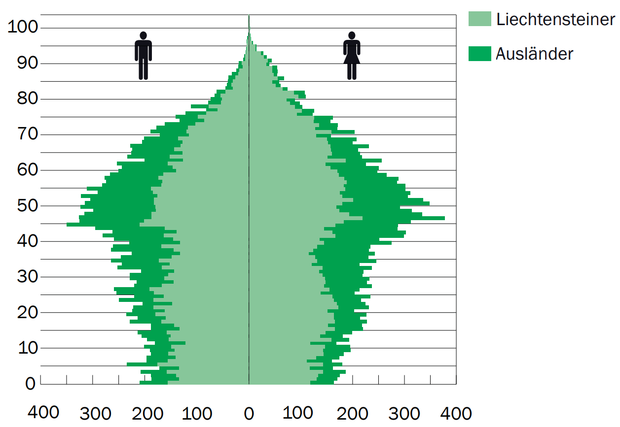 Половозрастная пирамида (Лихтенштейнцы и иностранцы) 31.12.2015